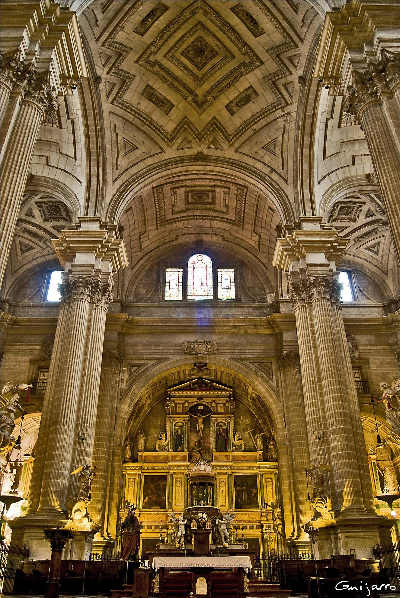 Vista del Altar Mayor de la catedral de Jaén, tras el cual se encuentra la Capilla Mayor.